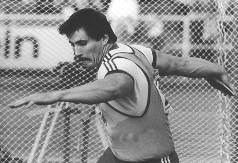 Jürgen Schult ADN-ZB Koard 21.8.87-oo-Potsdam: 38. DDR-Leichtathletik-Meisterschaften- Der Schweriner Jürgen Schult, Weltrekordhalter im Diskuswerfen, errang mit glänzenden 69,18 Metern den DDR-Meistertitel.